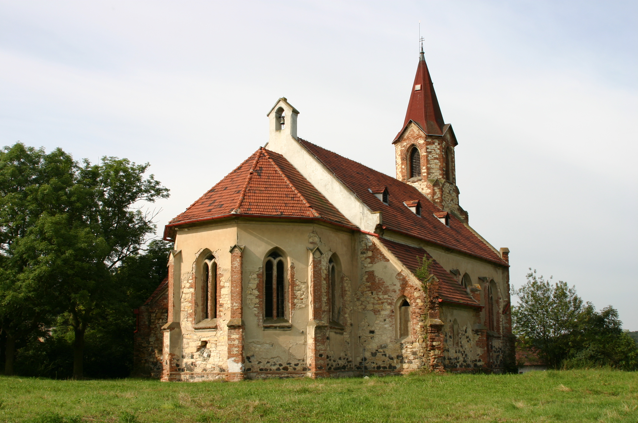 Kostel v Lužici v okrese Most